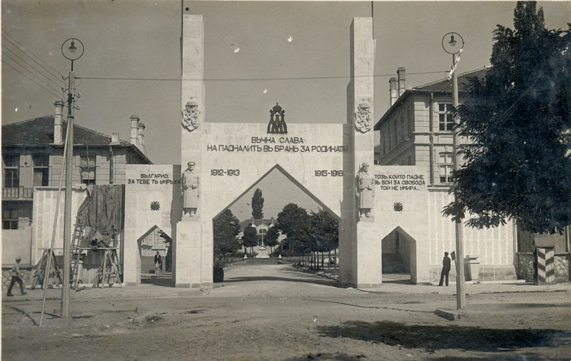 Паметникът-портал на 8-ми Приморски пехотен полк. Общ изглед на паметника, построен през 1936 г.